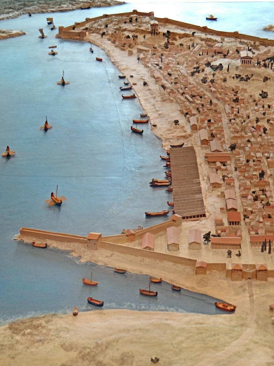 Maquette de la ville de Marseille hellénistique F. Trouvé, 1982 IIIè-IIè siècle av. J.-C. Maquette au 1/500 Le musée d’Histoire de Marseille a été remarquablement rénové au niveau de la muséographie, des salles et services annexes et des dispositifs multimédias numériques, à l'occasion de la grande manifestation Marseille-Provence 2013. Il présente sur 3.500 m2 des objets exceptionnels, de la préhistoire à nos jours, en particulier les restes de navires grecs et romains, découverts dans les fouilles du quartier du centre Bourse et de la place Jules Verne, des maquettes de Marseille à différentes époques, de nombreuses archives et oeuvres d'art... A l'extérieur du musée, un jardin des vestiges a été aménagé sur le site de la "corne" de l'ancien port antique. Le site du musée d'Histoire de Marseille L'extension numérique du musée d'Histoire de Marseille orbes.mobi/grpmt-innovision_extnum-mhm_plateforme-hm/